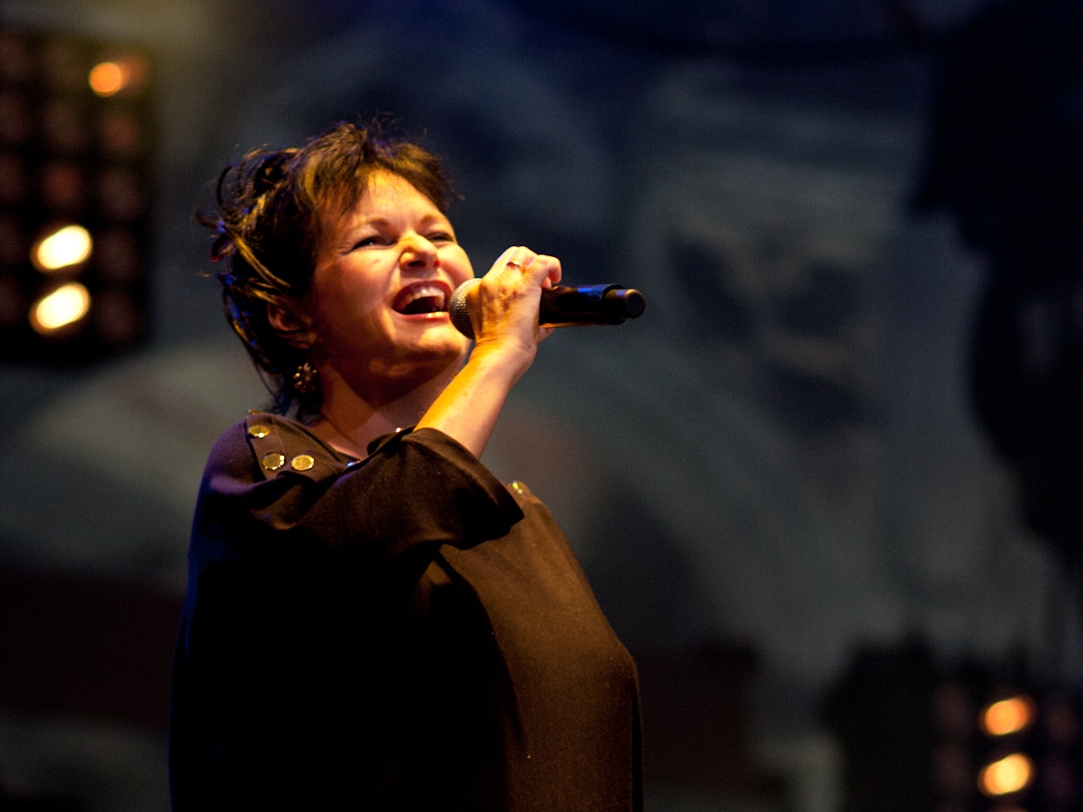 Maurane à la Fête de la Fédération Wallonie-Bruxelles le 24 septembre 2011